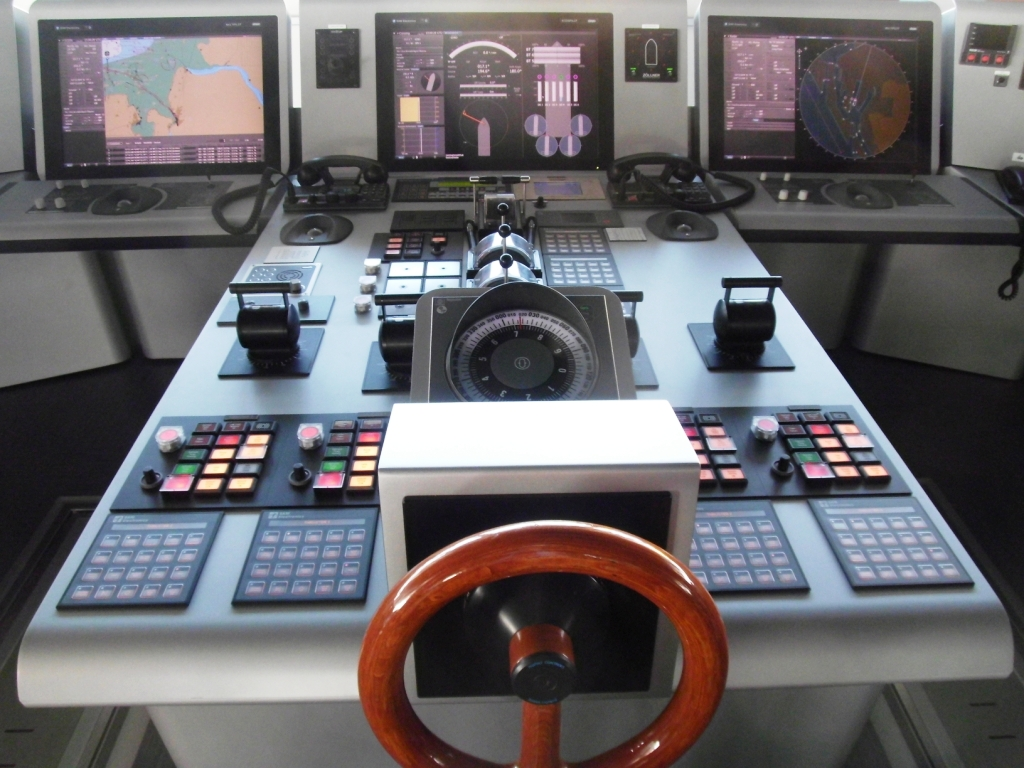 Moderner Fahrstand auf der Brücke